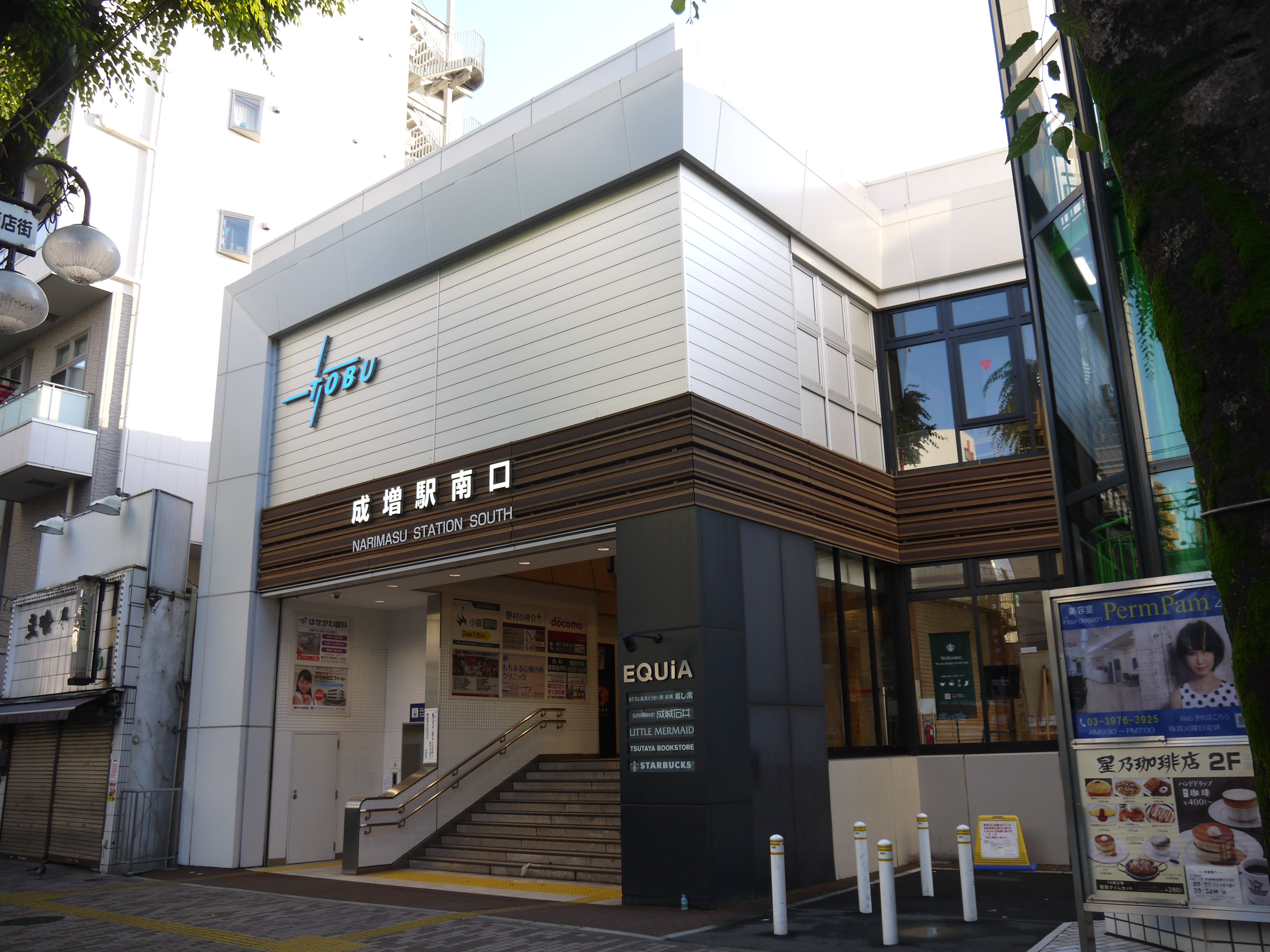 成増駅南口 Panasonic Lumix DMC-GF3